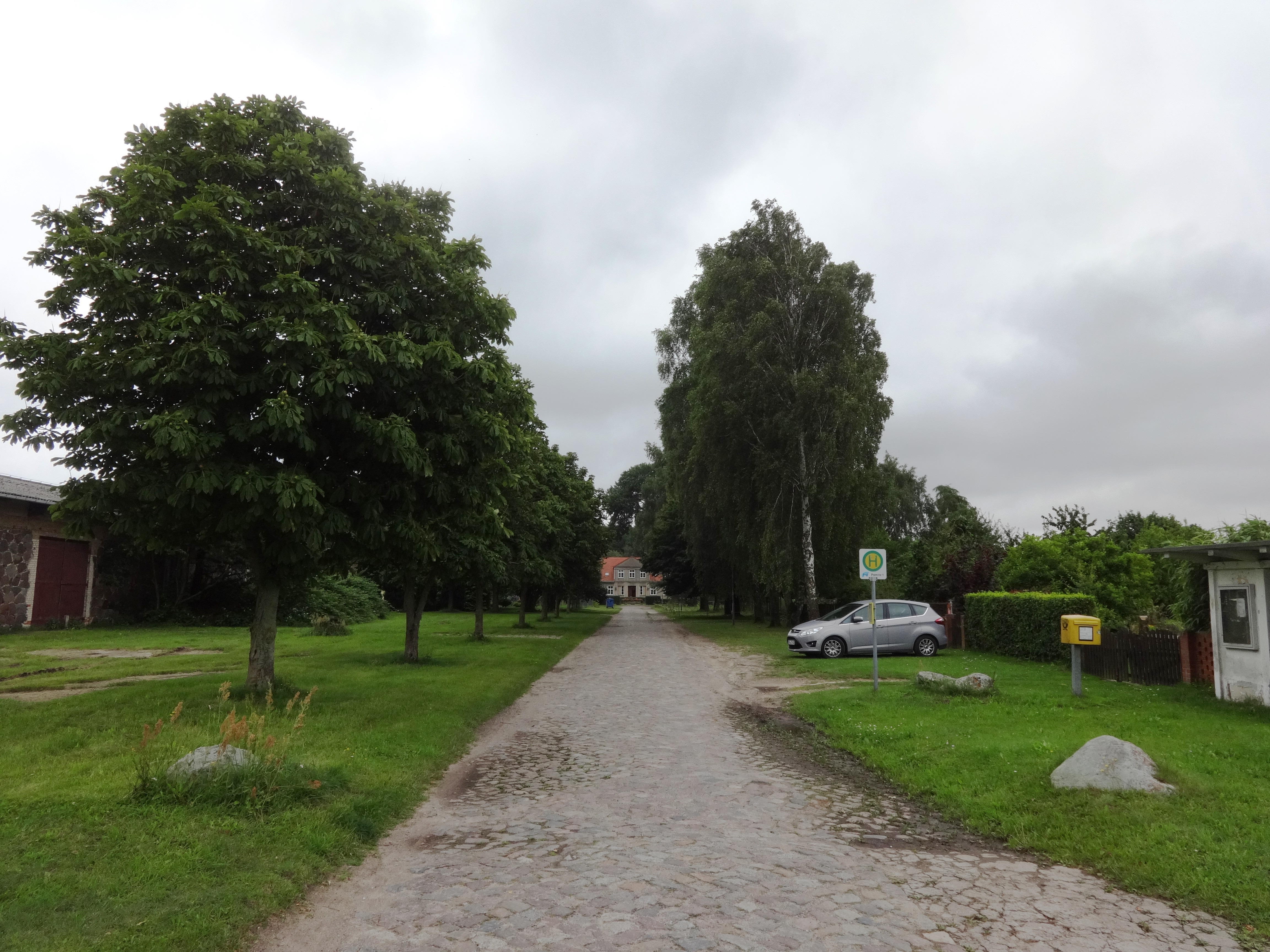 Pamitz, ein Ortsteil der Gemeinde Klein Bünzow in Mecklenburg-Vorpommern